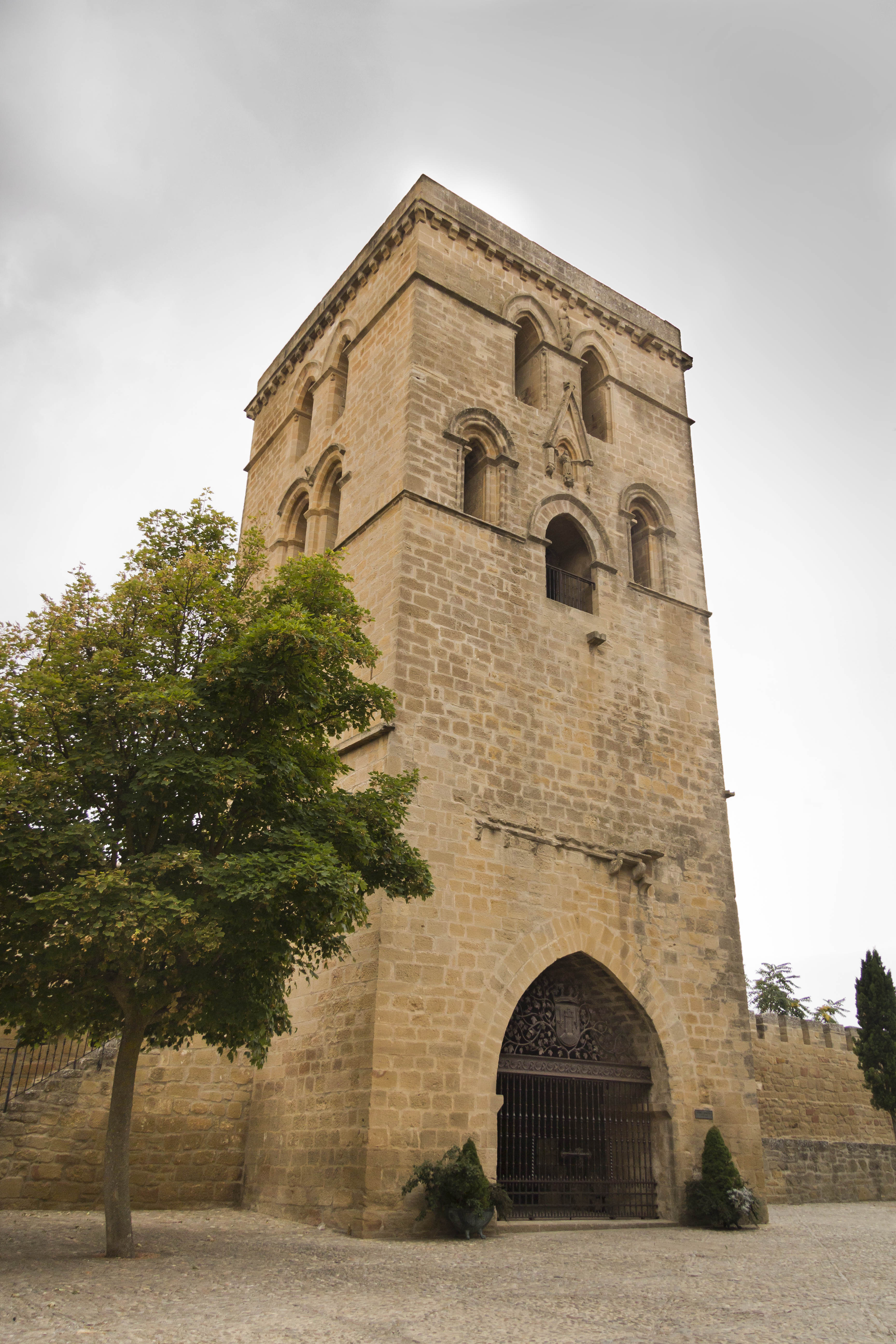 Torre abacial o torre de Santa María, en Laguardia, Álava, (España). Forma parte del conjunto del monasterio templario de Santa María de los Reyes.